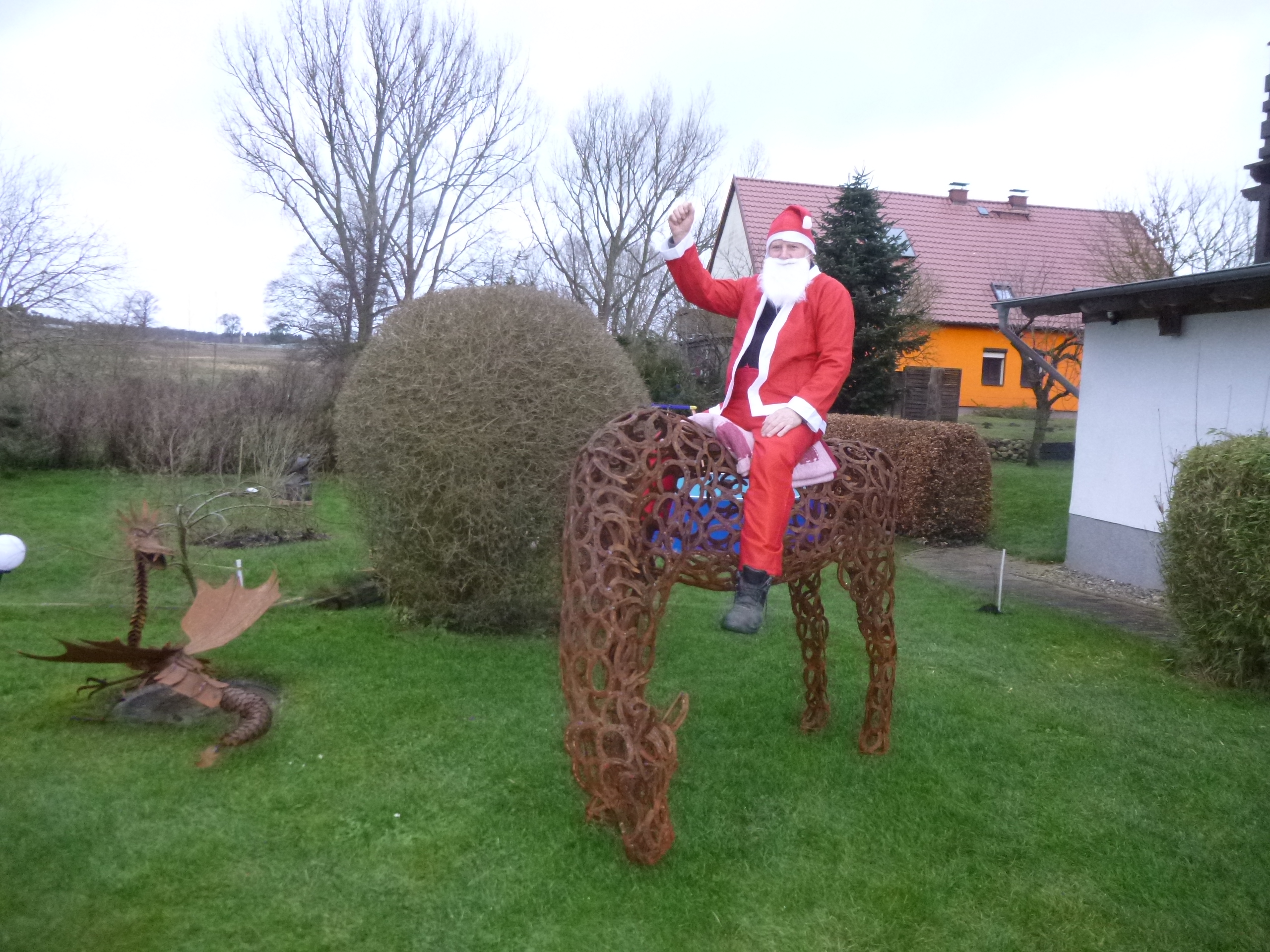 Der Metallbildhauer Gerald Schwörk als Weihnachtsmann auf seinem Hufeisenpferd in Fincken.